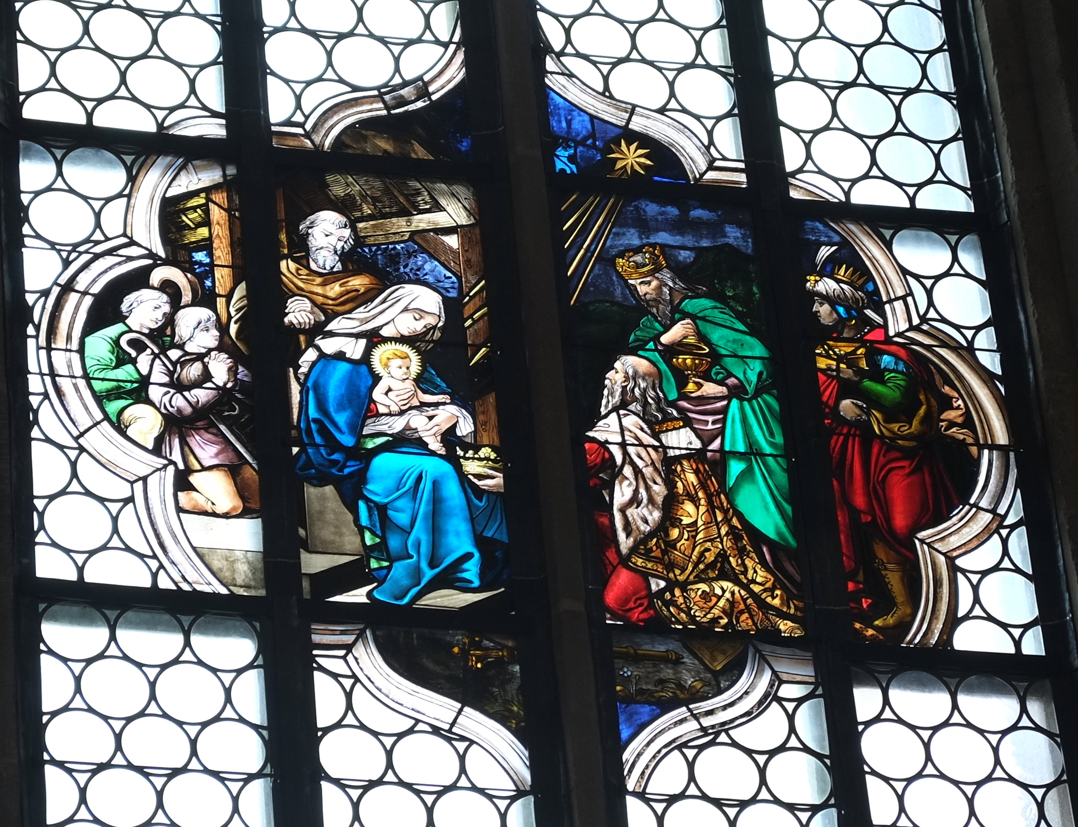 Bleiglasfenster in der Kirche St. Andreas in Weißenburg in Bayern